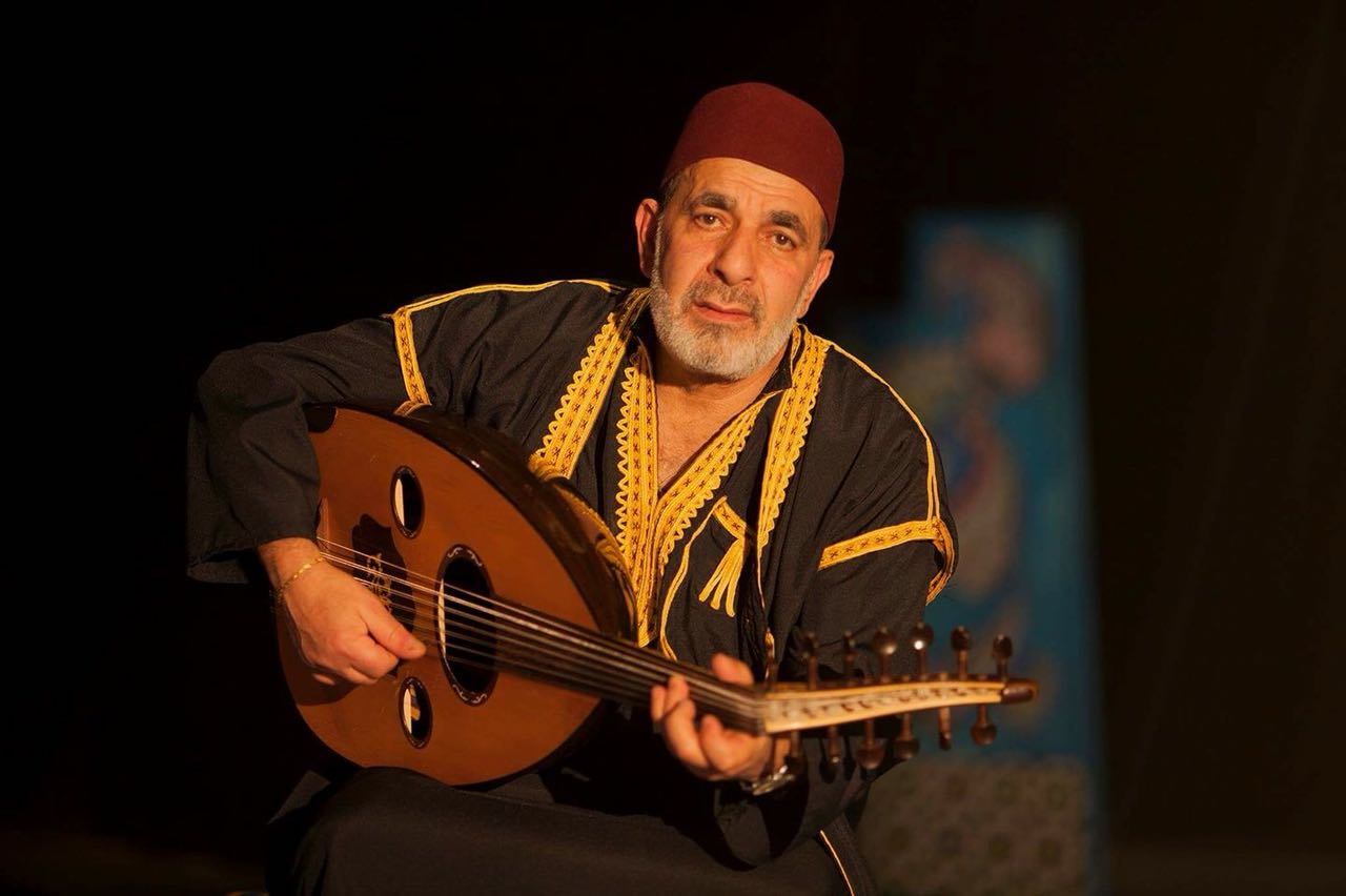 كمال بلان في مسرح دوروفا